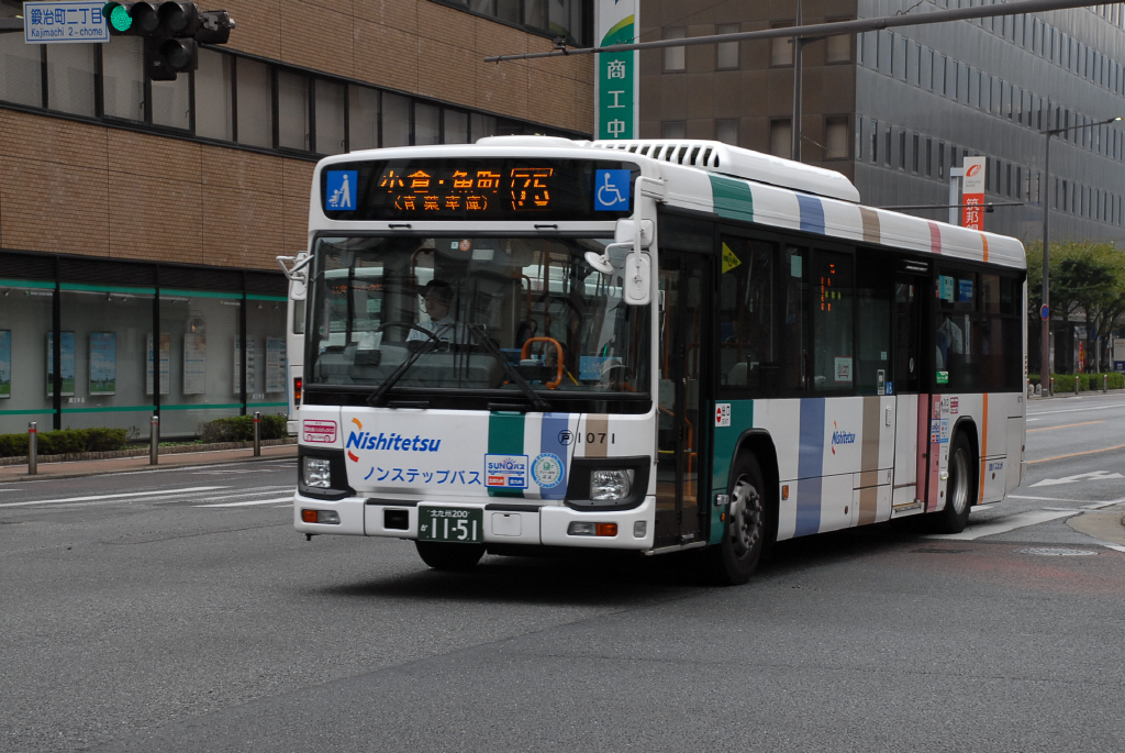 小倉北区にて、2018-9-24撮影